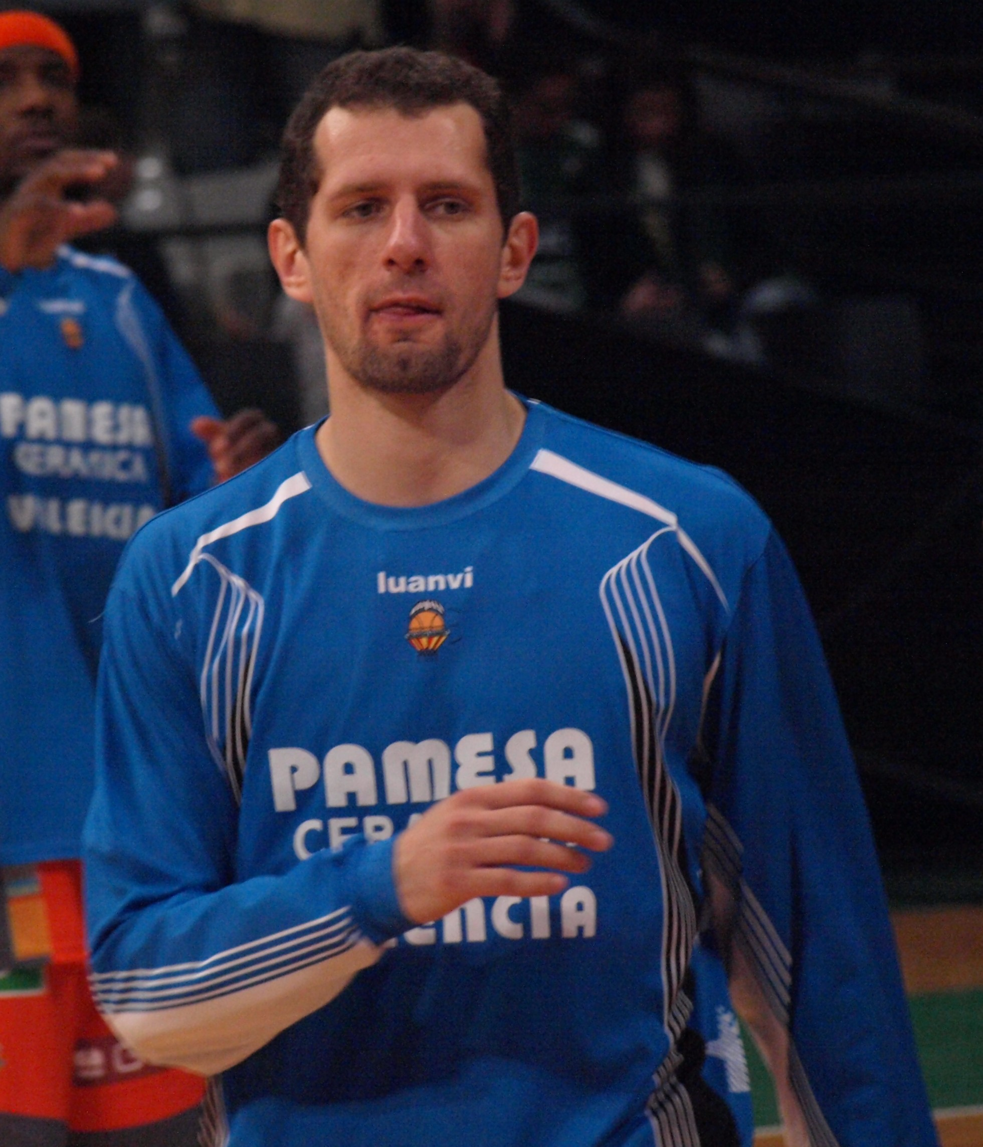 Vule Avdalović en el partido que enfrentó a su equipo, el Pamesa Valencia, al DKV Joventut de liga ACB en el Pabellón Olímpico de Badalona en abril de 2009.